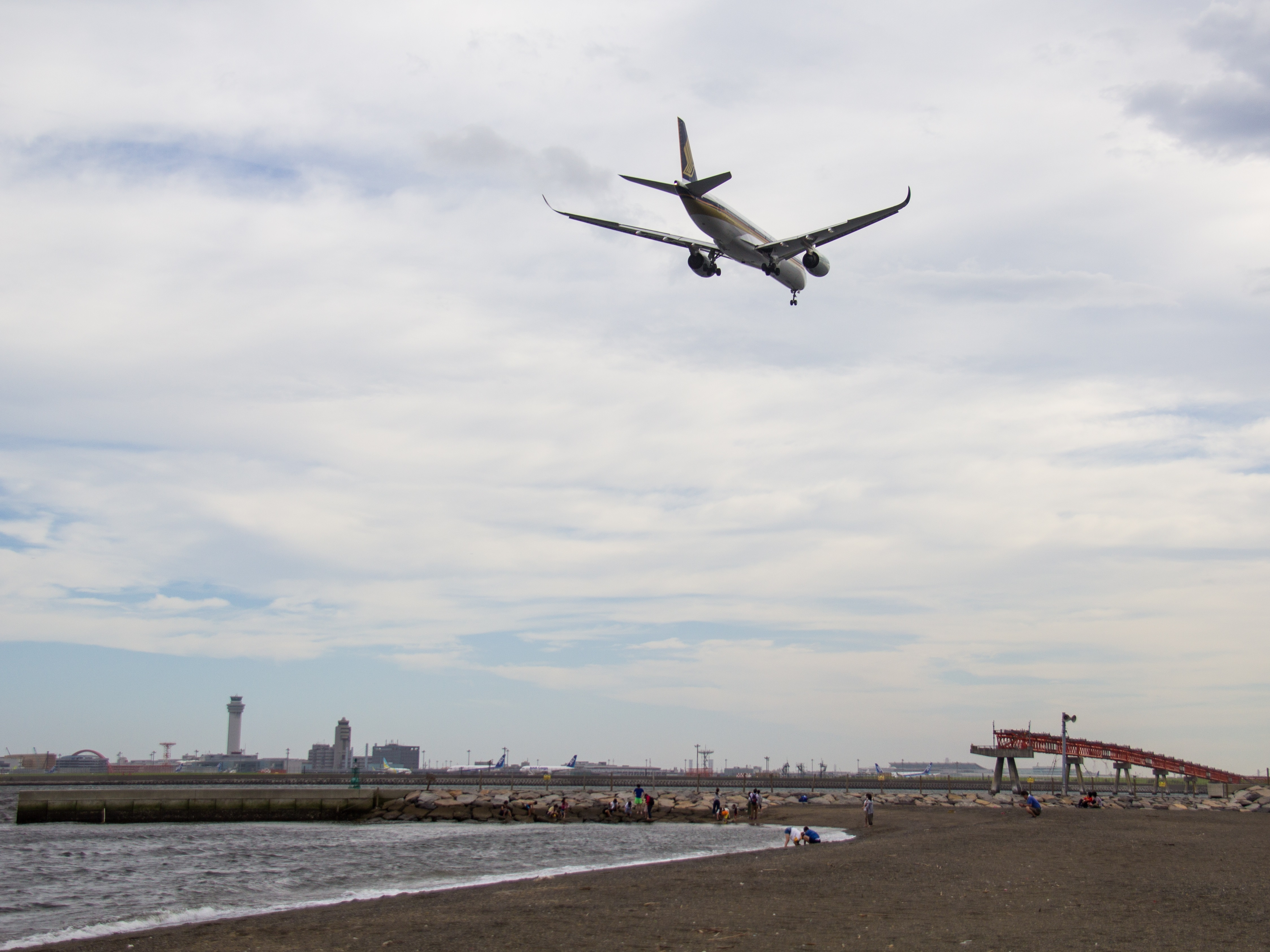 城南島海浜公園